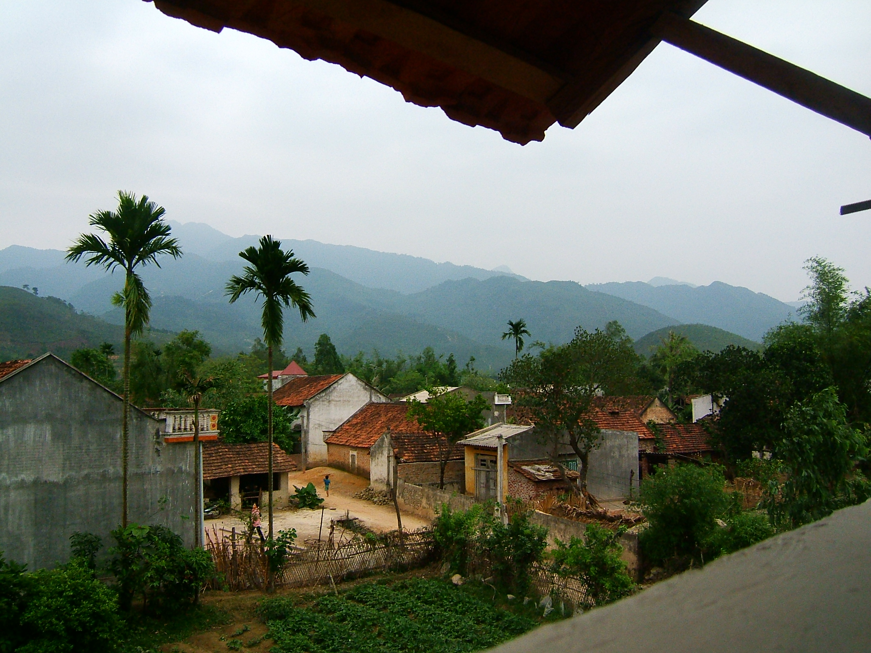 Một phần quang cảnh xã Đạo Trù, huyện Lập Thạch. Xã Đạo Trù nằm dưới chân dãy núi Tam Đảo, là nơi sinh sống của đồng bào dân tộc thiểu số Sán Dìu.